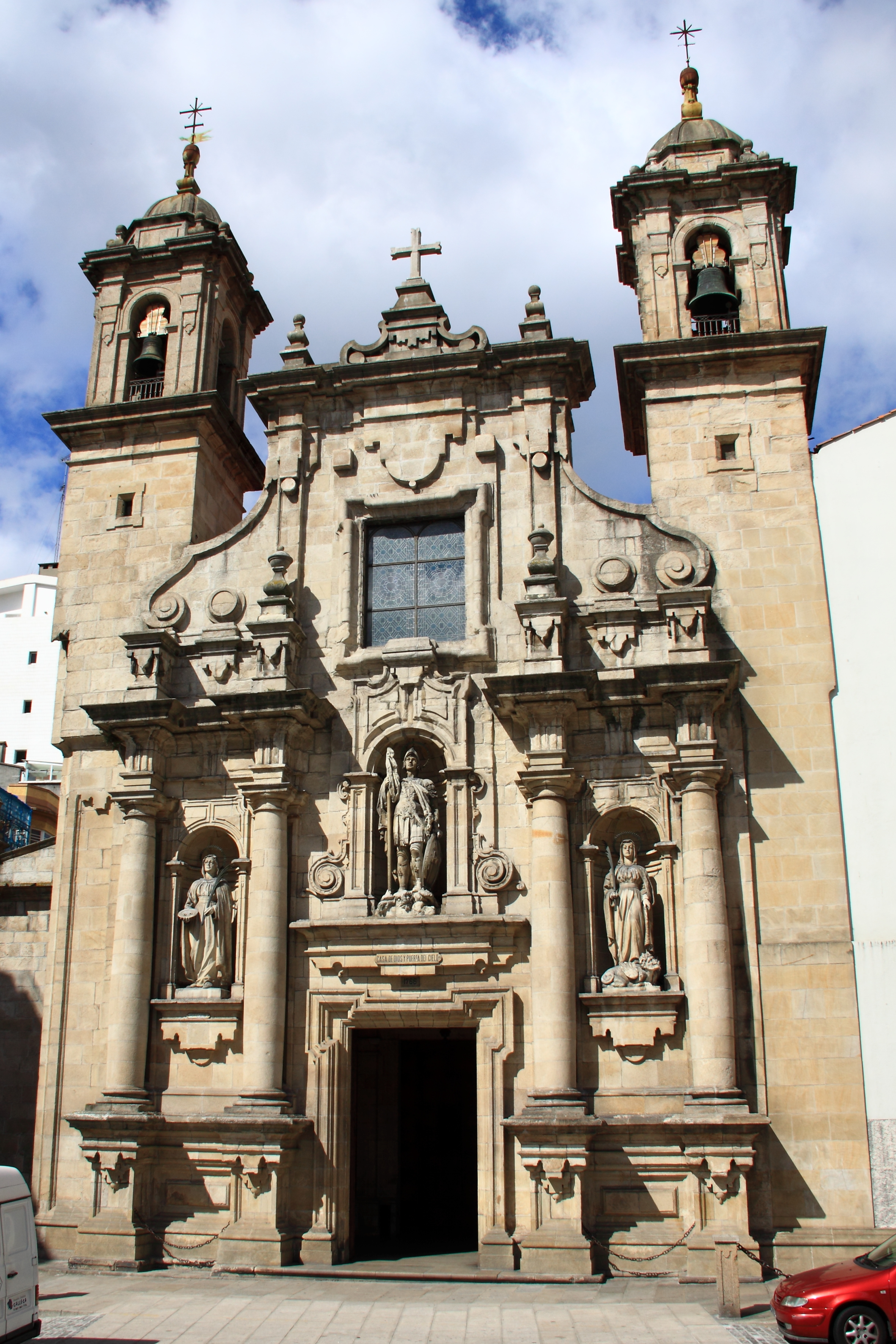 Iglesia de San Jorge, A Coruña